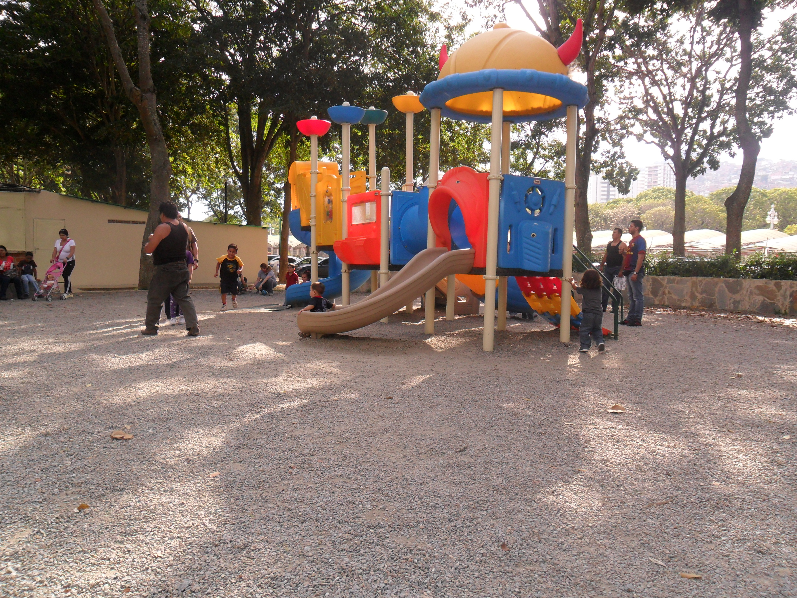 El Lago del Circulo Militar en Fuerte Tiuna, esta por el Paseo Los Próceres de Caracas, es un centro recreacional con una Laguna hermosa con patos, tortugas, peces y Aves. También tiene parques para niños, centro de bateo, canchas deportivas, botes para remar, fuente de soda, entre otros.